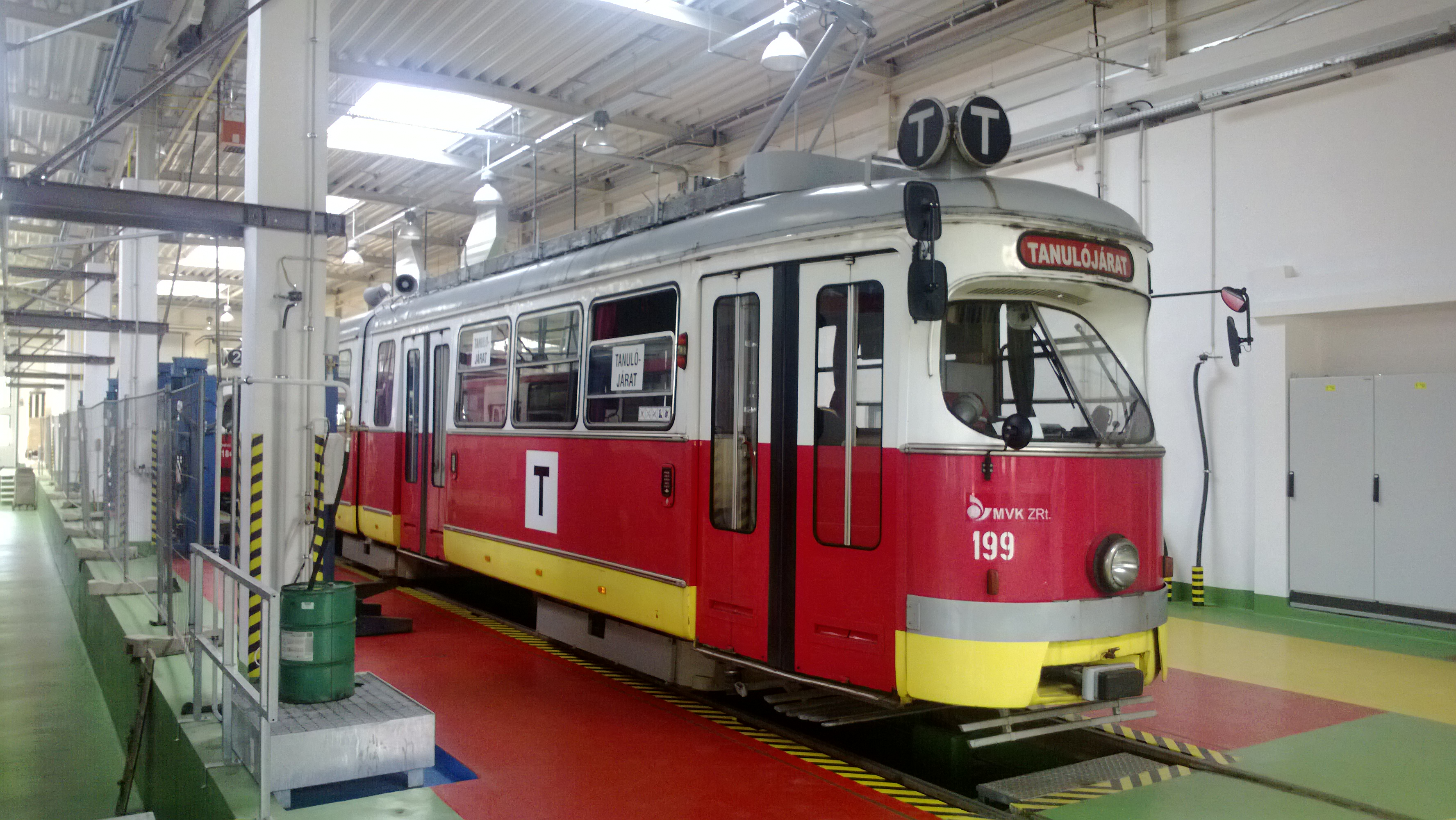 Miskolc járműállománya, Siemens villamos 199-es kocsi, a felújított remízben